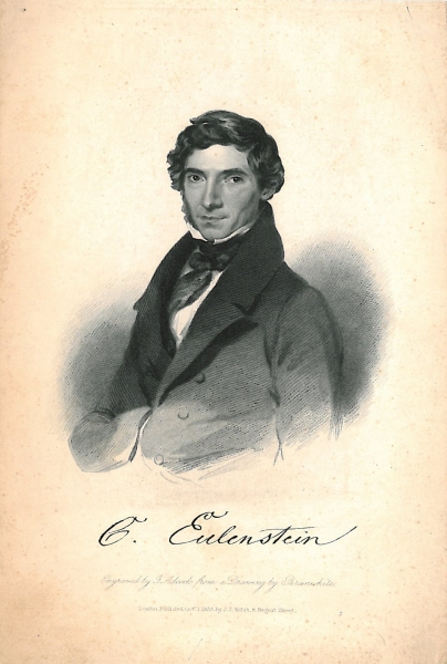 Der Maultrommelspieler Karl Eulenstein. Stahlstich (?), 13 × 19,5 cm. Druck J. J. Welsh, London. Frontispiz des Buchs A sketch of the life of C. Eulenstein, the celebrated performer on the jews' harps. London : J. J. Welsh, 1833.